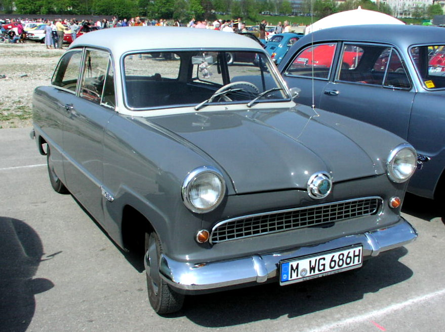 Ford Taunus 12m (G13) (1957-1959)